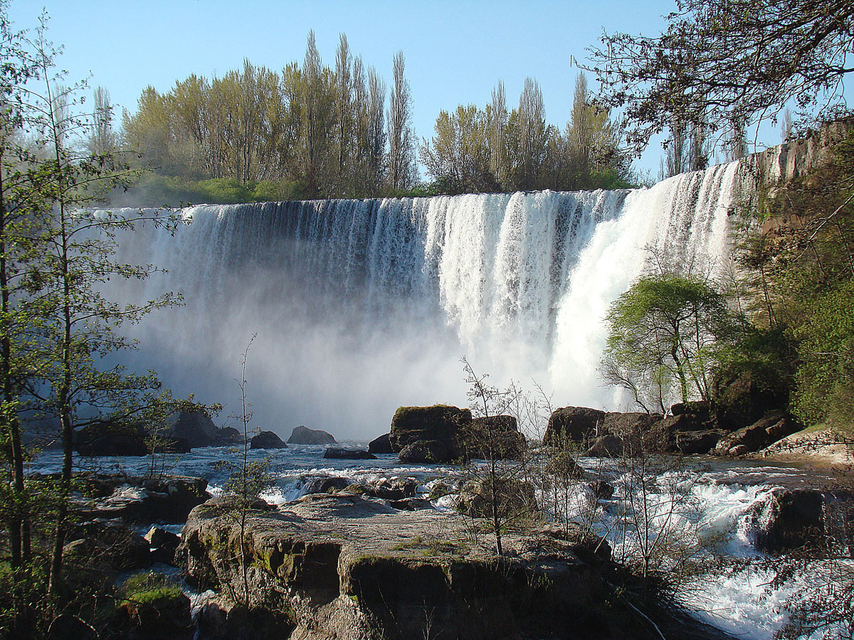 Salto del Laja, ubicado en la Provincia de Biobío, Región del Biobío, Chile.